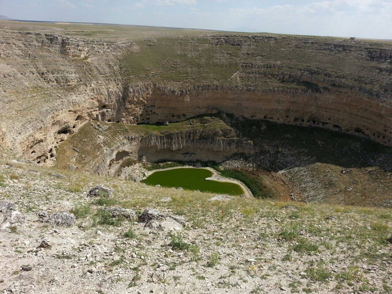 Kategori:Karapınar